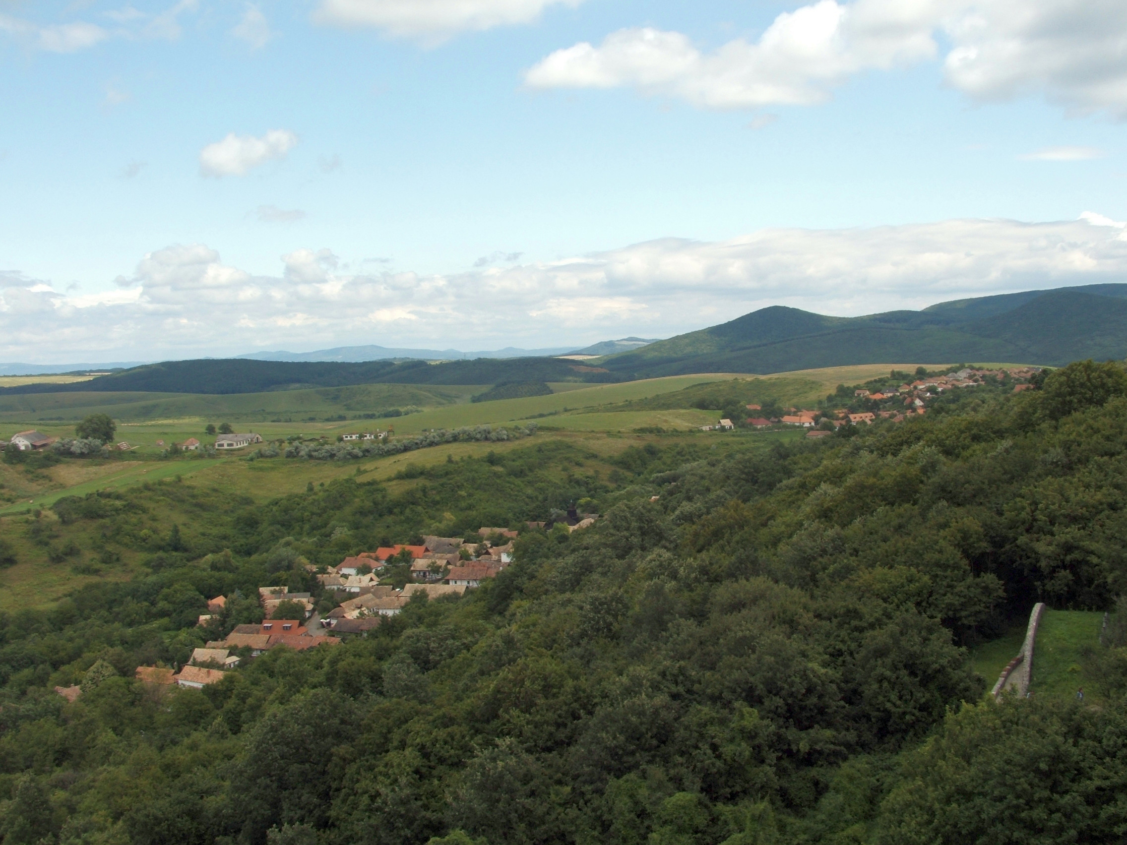 Hollókő látképe a várból